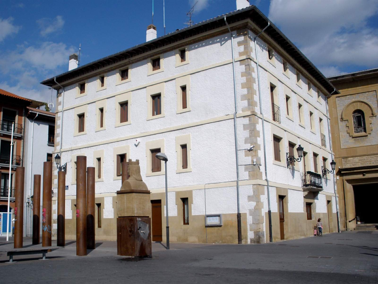 Ayuntamiento de Villava (Navarra)